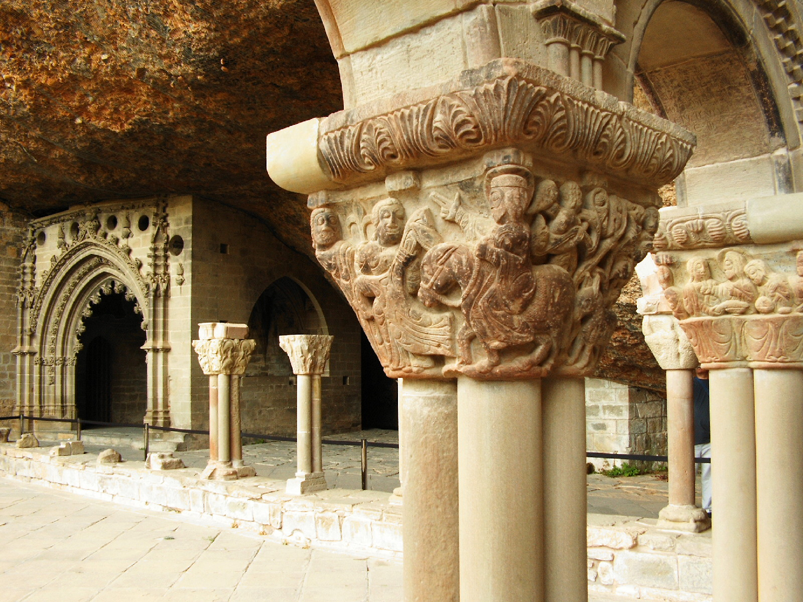 Capitel número 16 del claustro del Monasterio de San Juan de la Peña. Describe la entrada triunfal de Jesús en Jerusalén.